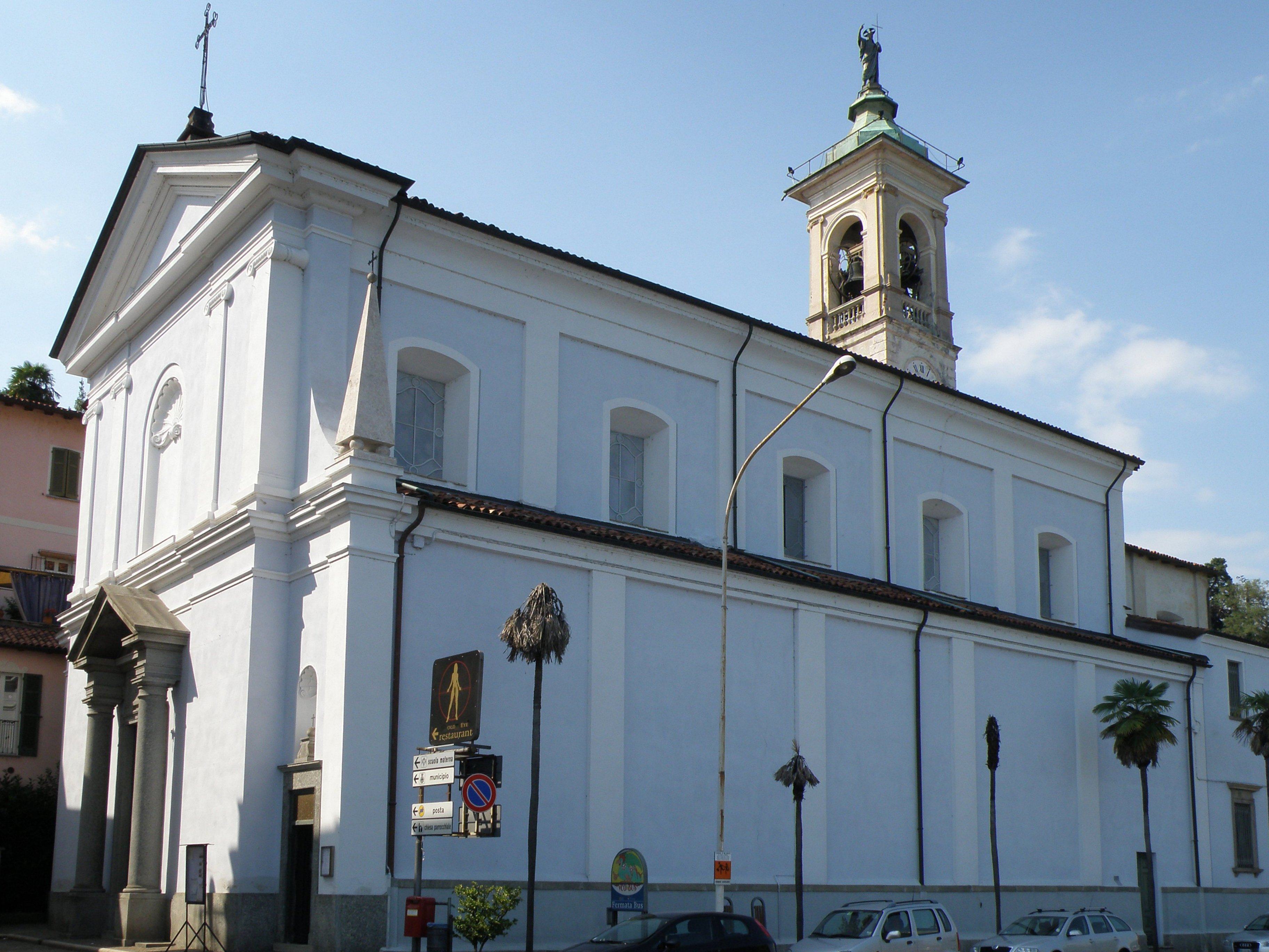 Belgirate (VB). Chiesa parrocchiale.